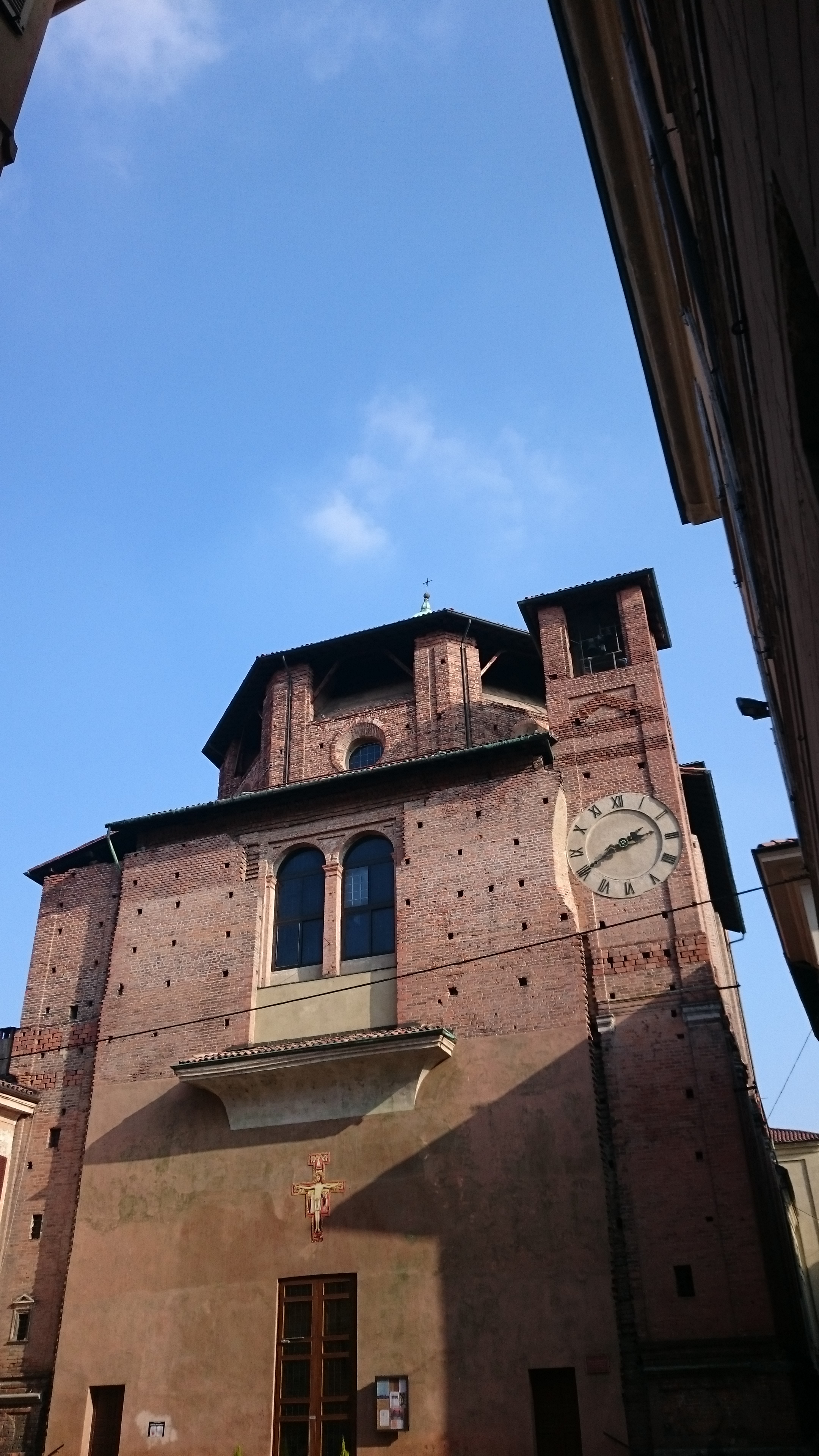 Photographie de l'église Santa Maria di Canepanova de Pavie.